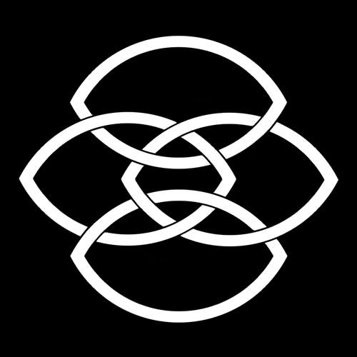 「音羽屋四つ輪」紋（染抜）